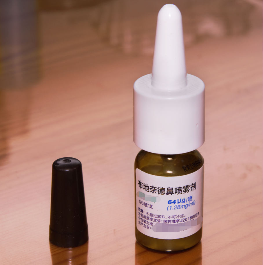 来自某一生产商的布地奈德鼻喷雾剂药物图片，已经隐去生产商信息